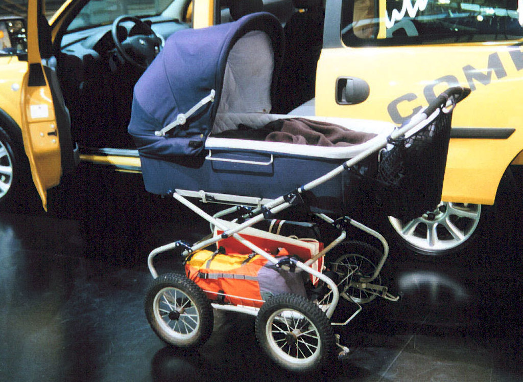 Kinderwagen 1